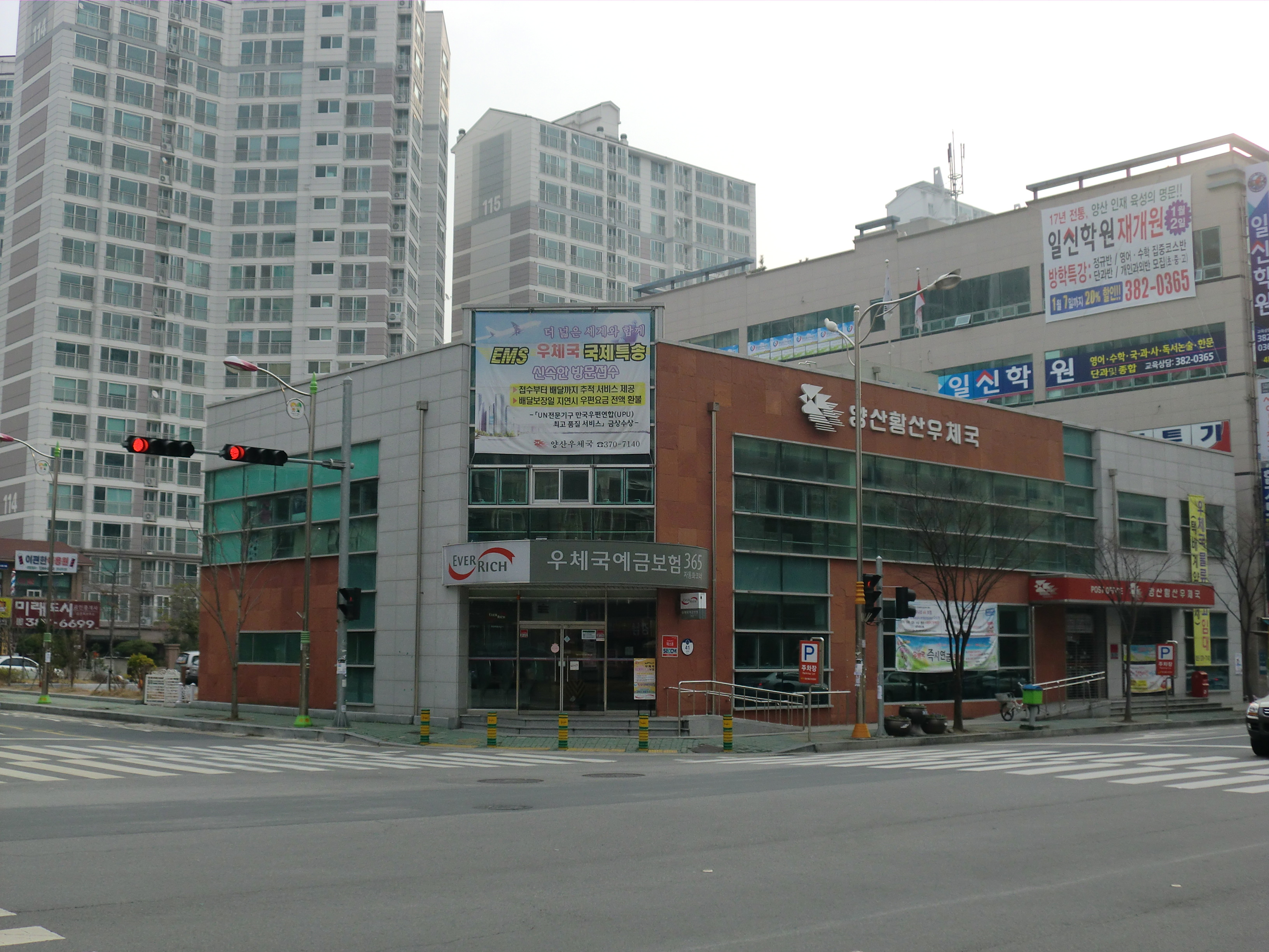 경상남도 양산시에 있는 양산황산우체국